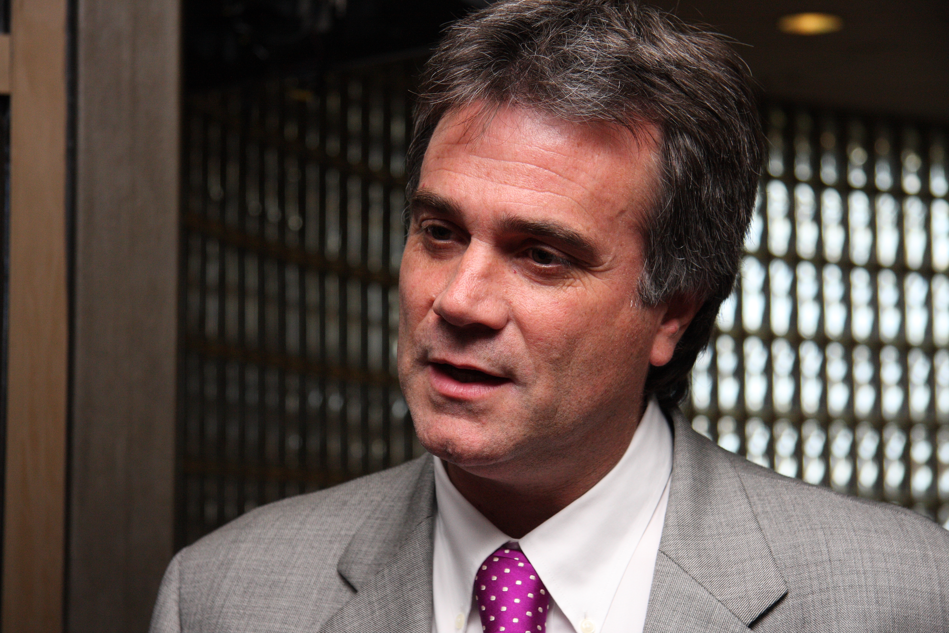 Diputado Juan Lobos Krause (1960-2011).